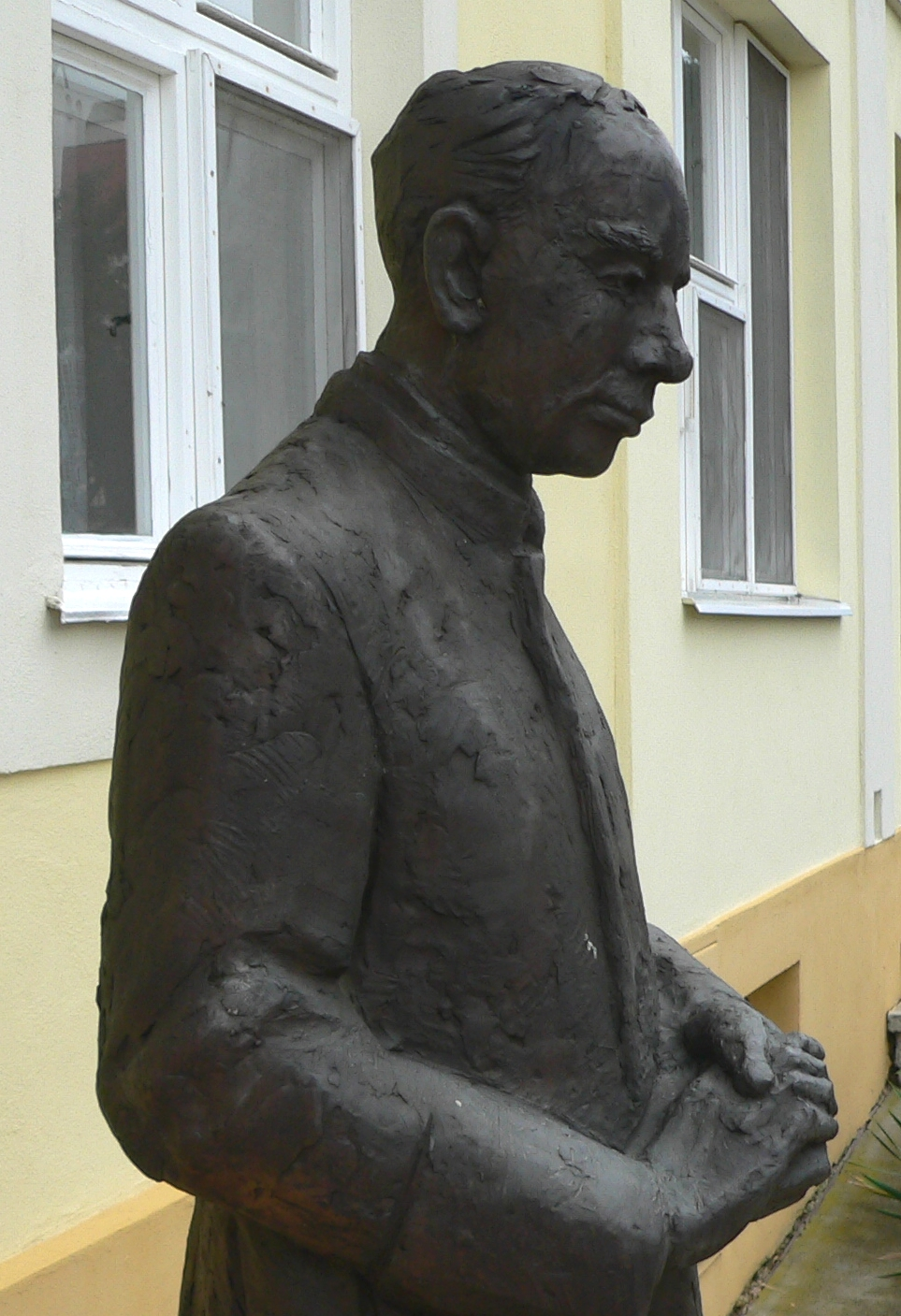 Socha kněze Antonína Šuránka před Pastoračním centrem v Ostrožské Lhotě, detail horní části. Akademický sochař Bořek Zeman z Uherského Hradiště, bronz, výška 200 cm, rok 2002.